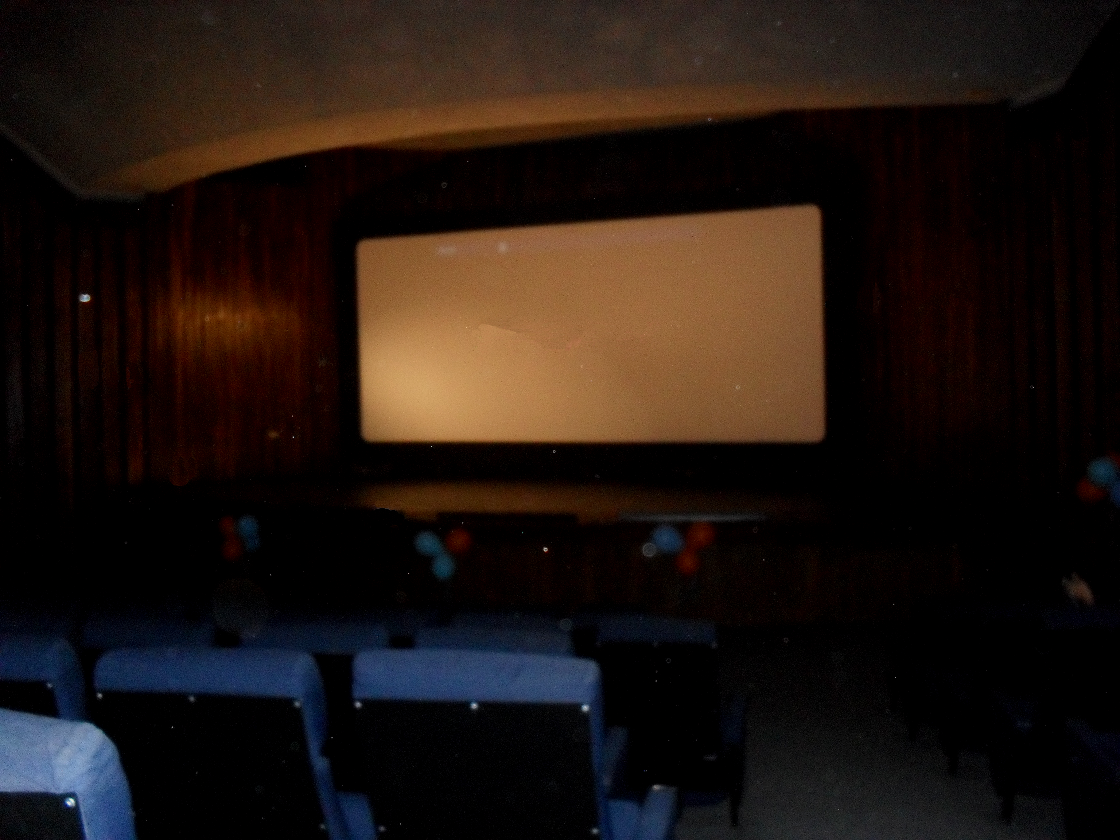 Sala Cinemateca Sede Museo de Bellas Artes.